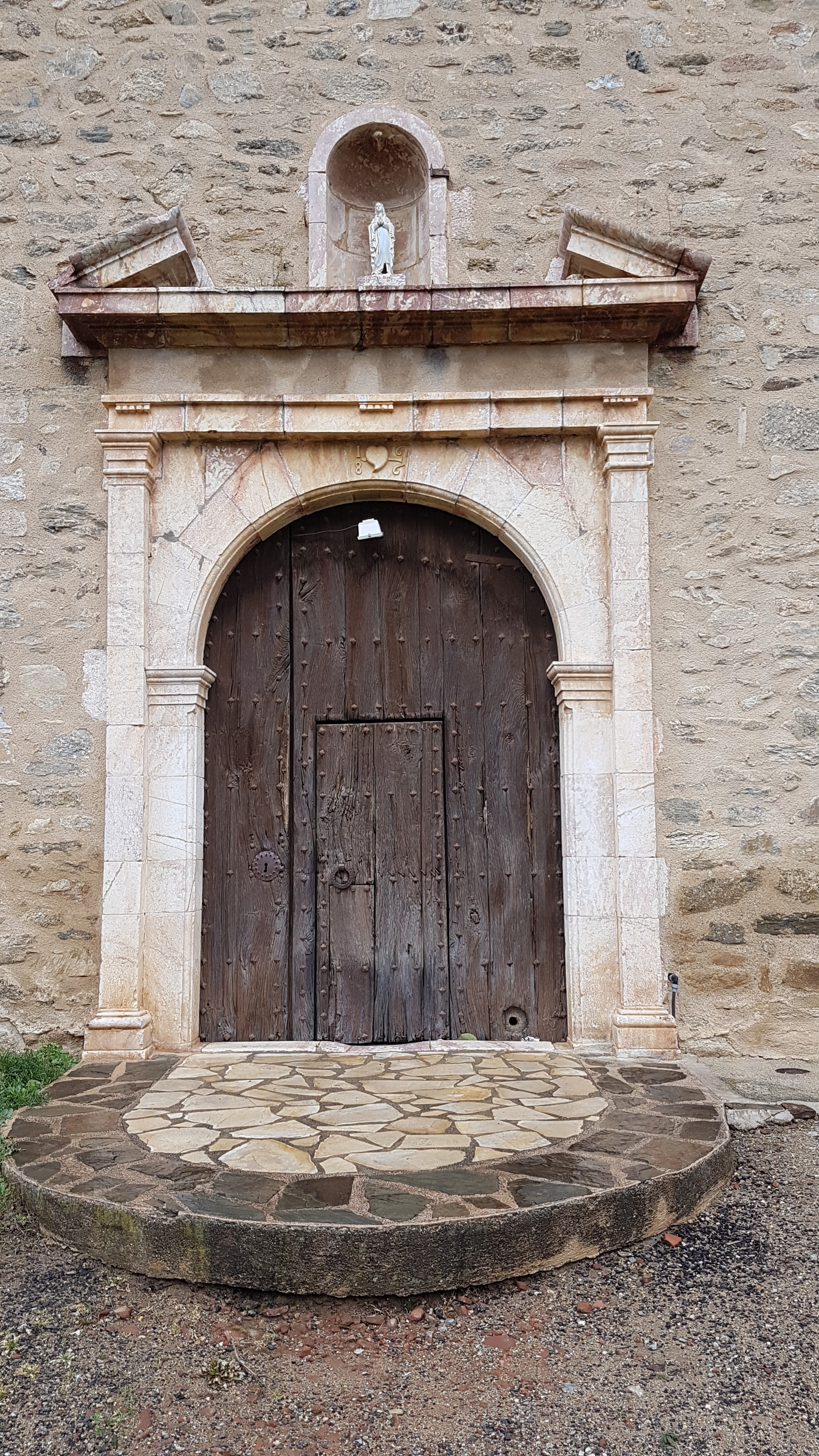 Le portail de l'église de la Nativité-de-Notre-Dame de Los Masos